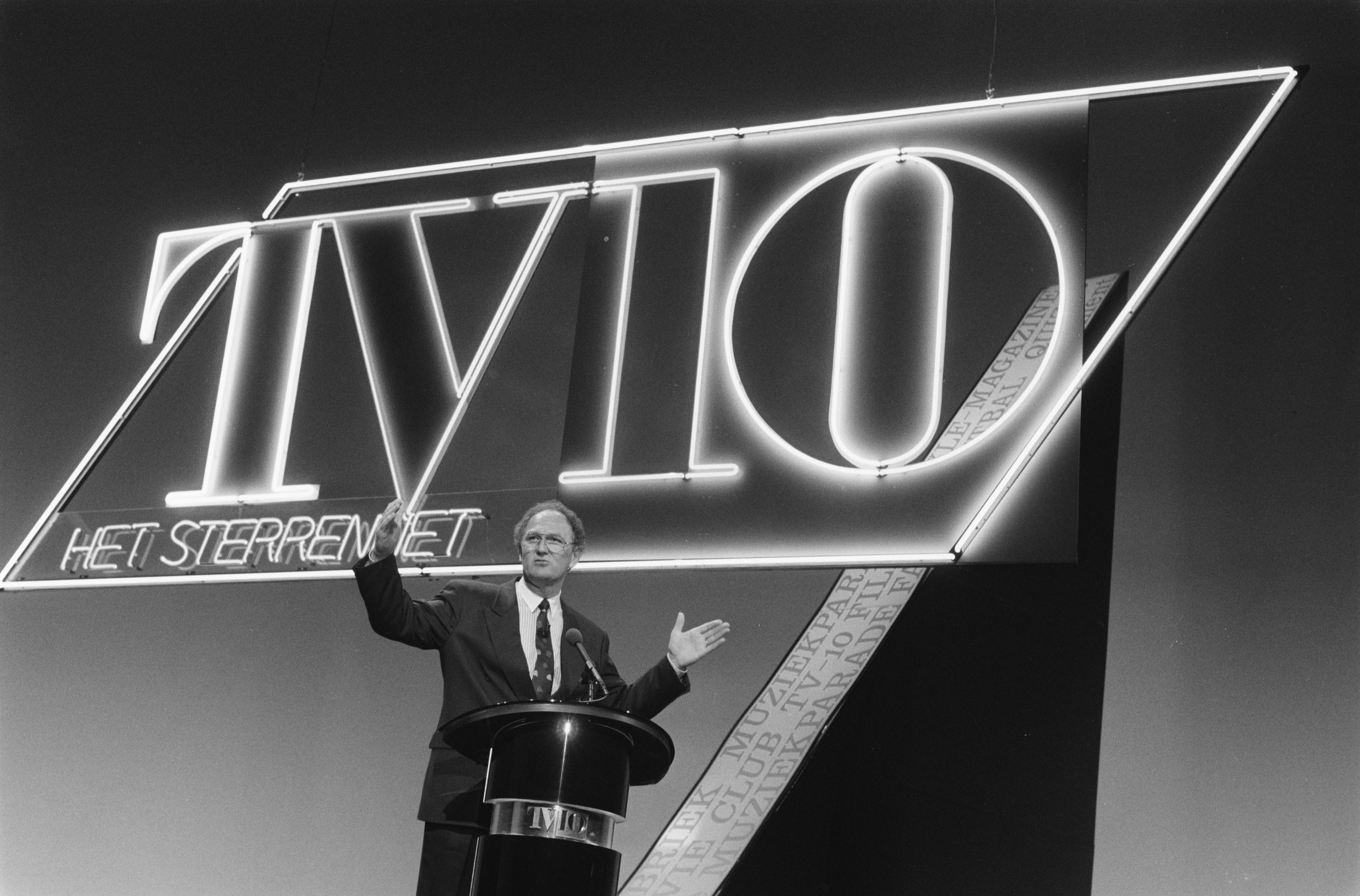 Collectie / Archief : Fotocollectie Anefo Reportage / Serie : Joop van den Ende presenteert TV10 Beschrijving : presentaties, TV-zenders Datum : 25 mei 1989 Trefwoorden : TV-zenders, presentaties Persoonsnaam : Ende, Joop van den Fotograaf : Croes, Rob C. / Anefo Auteursrechthebbende : Nationaal Archief Materiaalsoort : Negatief (zwart/wit) Nummer archiefinventaris : bekijk toegang 2.24.01.05 Bestanddeelnummer : 934-4600